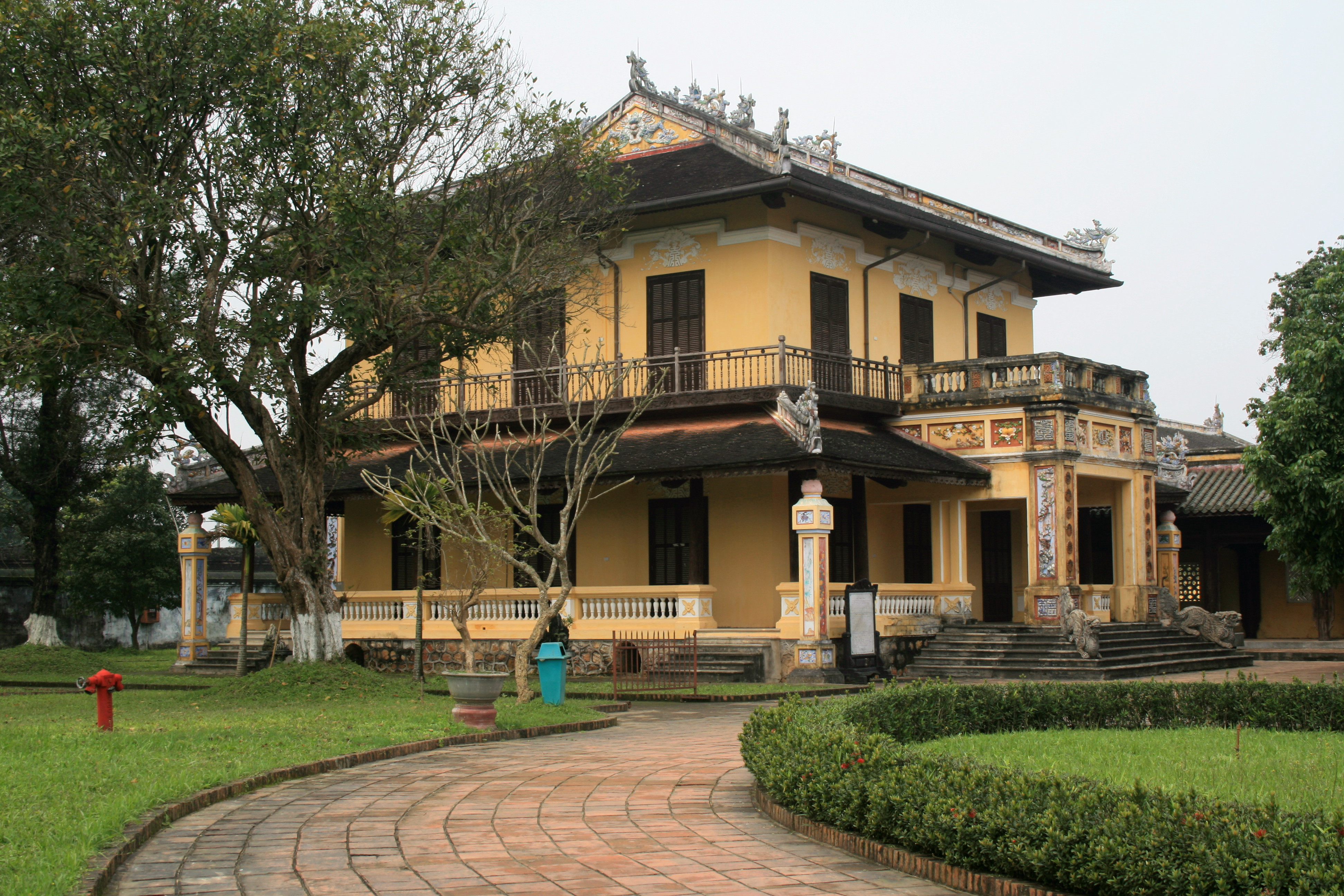 Lầu Tịnh Minh, Đại Nội Huế. Năm vi:1950 là tư thất của quốc trưởng Bảo Đại